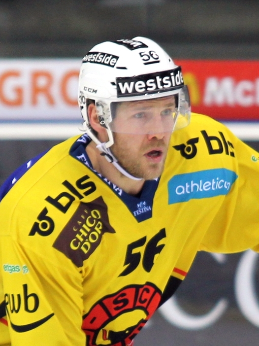 Timo Helbling (B 56).